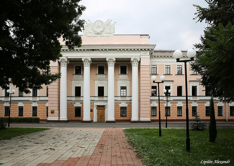 Гомель. Упраўленне КДБ